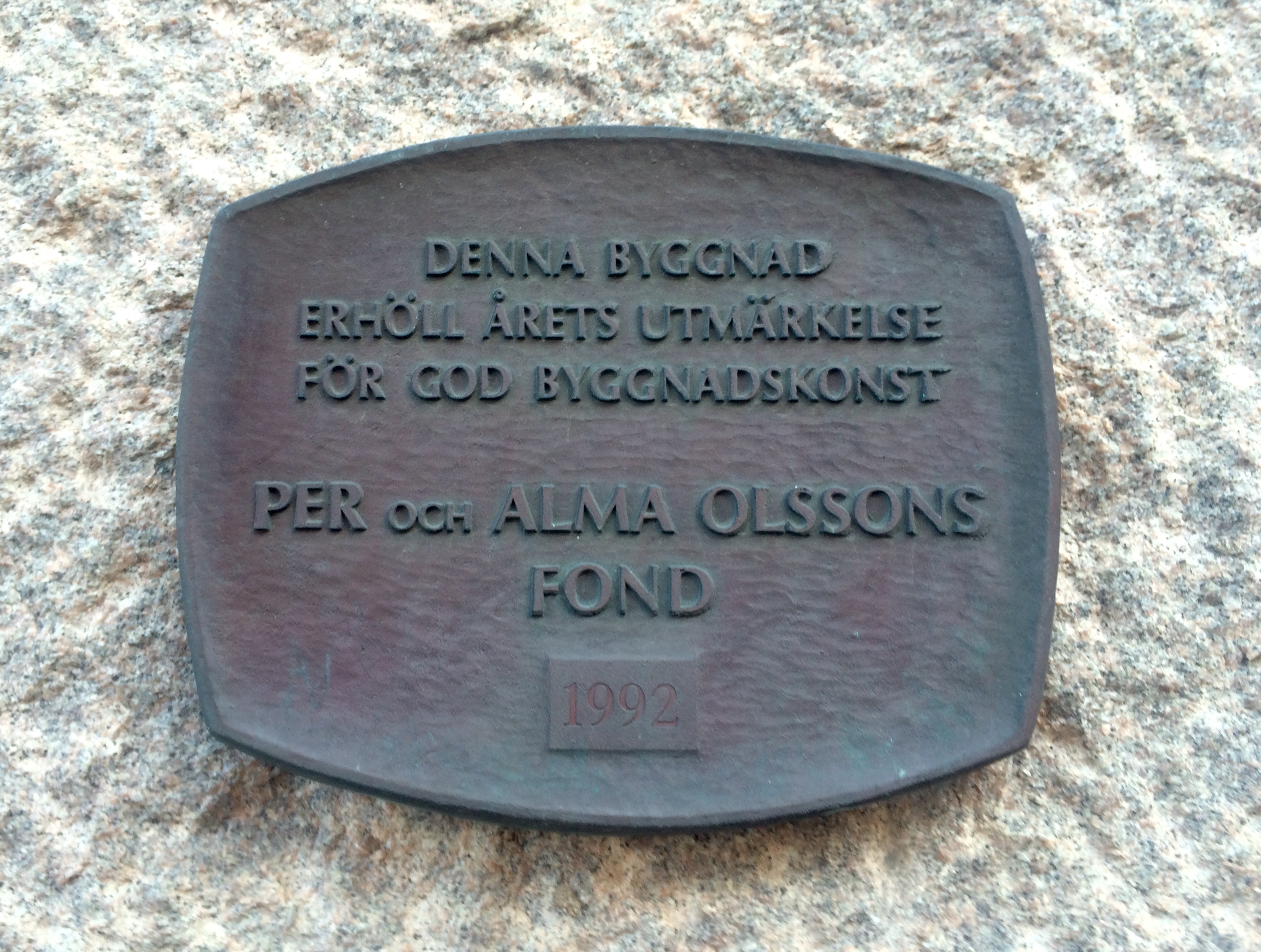 Göteborgs elektricitetsverk (Elyseum) erhöll 1992 års pris för god byggnadskonst ur Per och Alma Olssons fond. Plaketten uppsatt på byggnadens västra fasad.